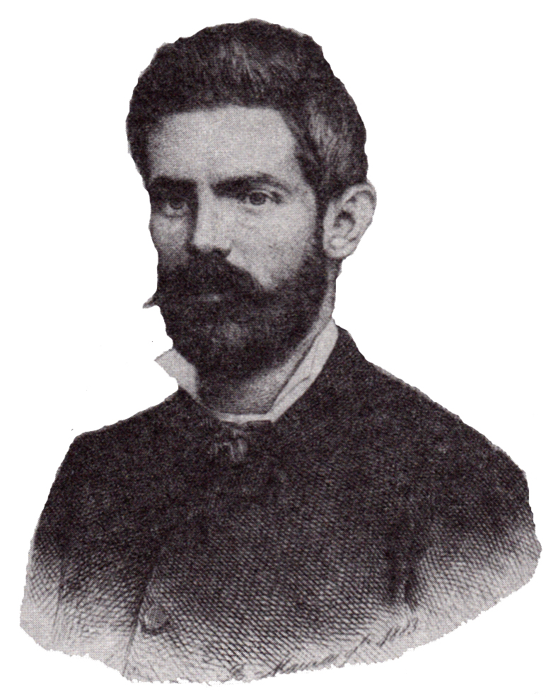 Foto de Andrés Muruais